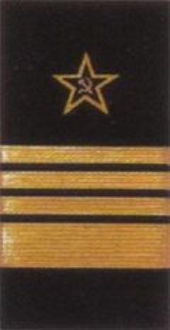 Знаки различия высшего ком. сост. флота до 1943 г., здесь нарукавные знаки различия «Адмирала» (ОФ8).